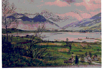 Akvarelo de Jakob Weidmann Elvido de Hombrechtikon en la distrikto Meilen, Kantono Zuriko, Svislando. Kiel heredanto de Jakob Weidmann la alŝutanto posedas la kopirajtojn pri fotoj de la bildoj, kies originalo troviĝas en lia galerio. Tiu-ĉi foto estas uzebla libere laŭ kondiĉoj de GNU 1.2.